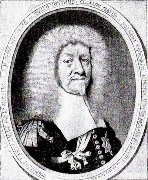 Rigsråd og stiftamtmand Henrik Rantzau (1599-1674)